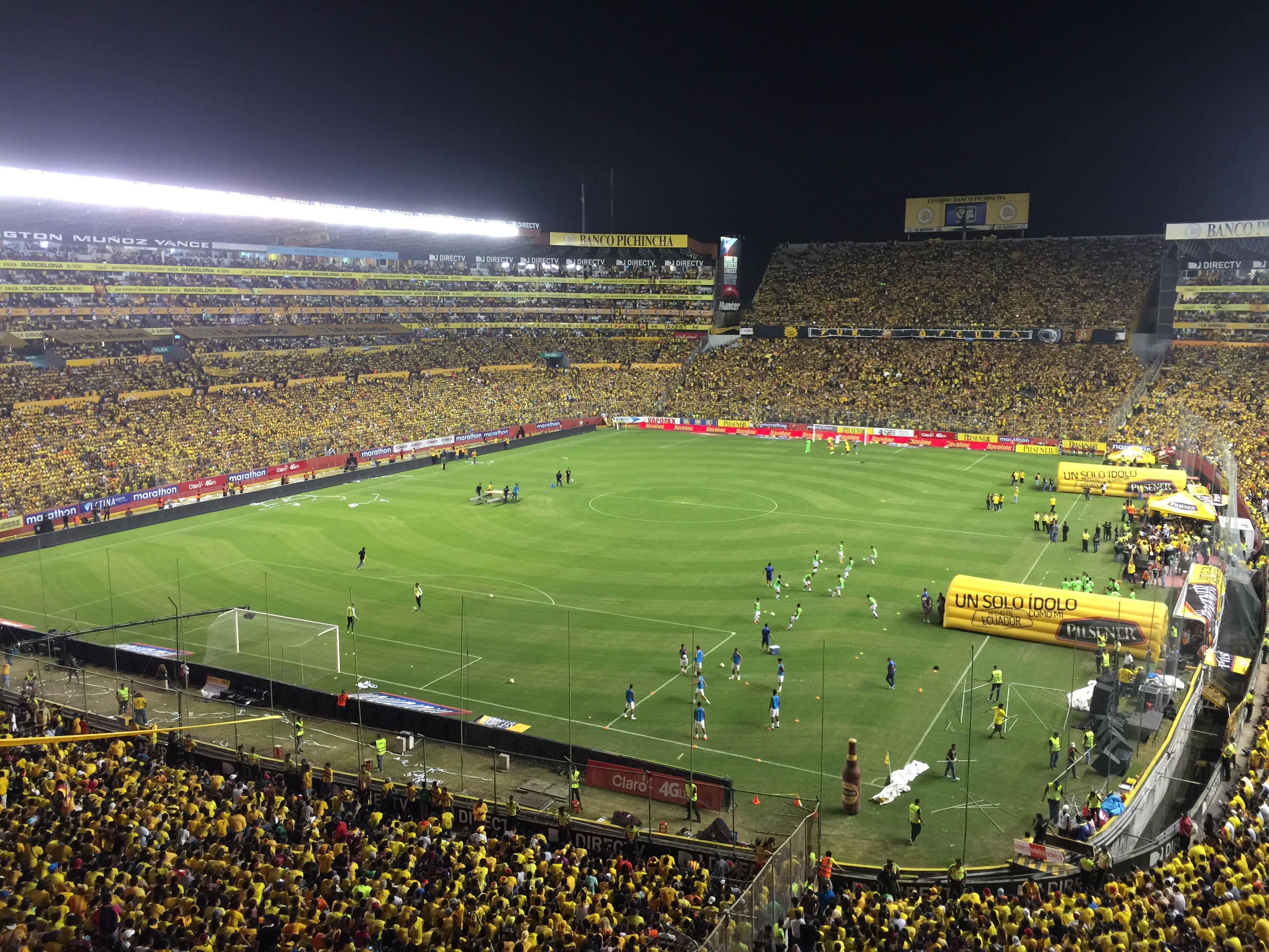 NOCHE AMARILLA 2016 BARCELONA